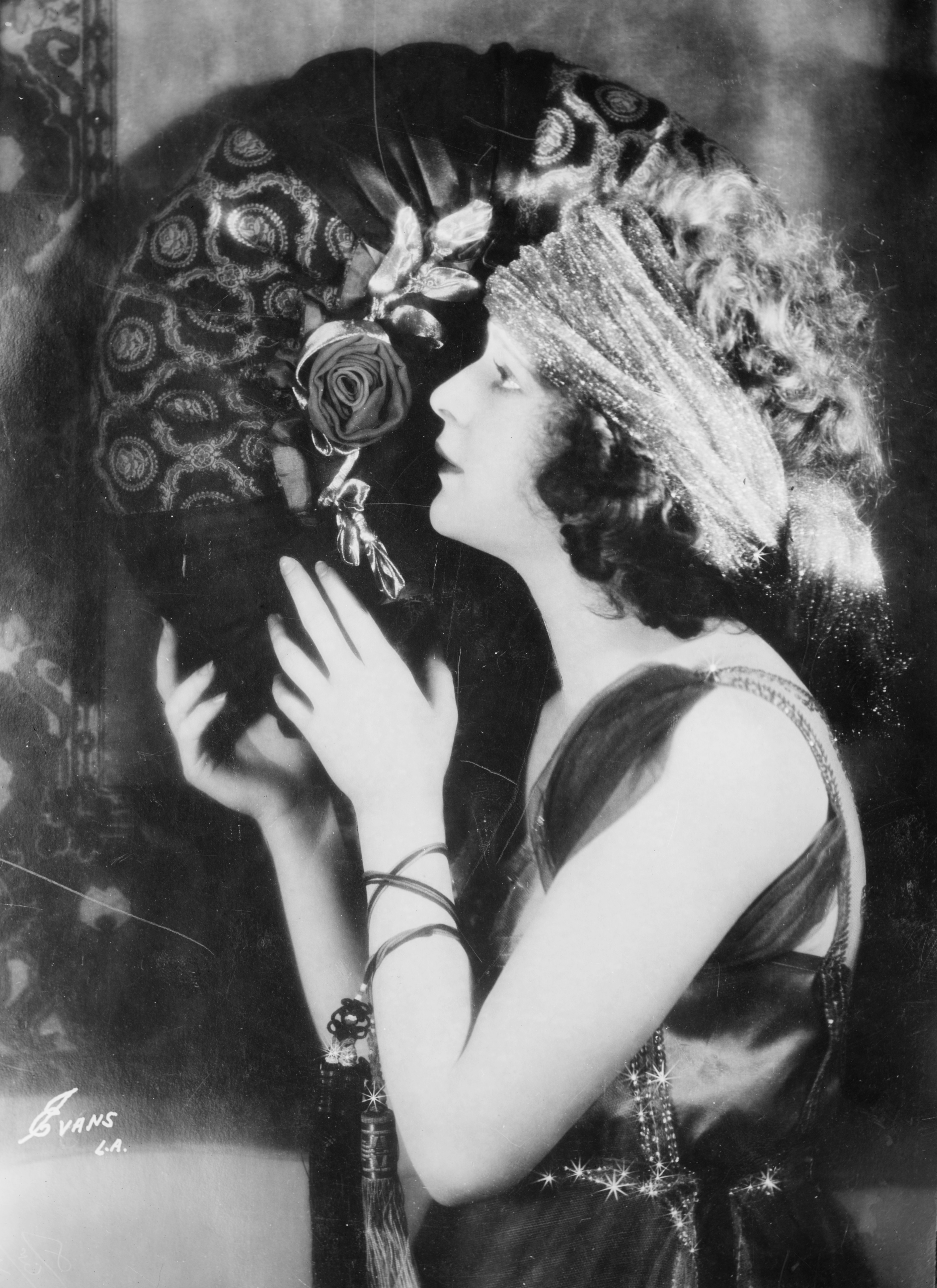 Actress Marguerite De La Motte